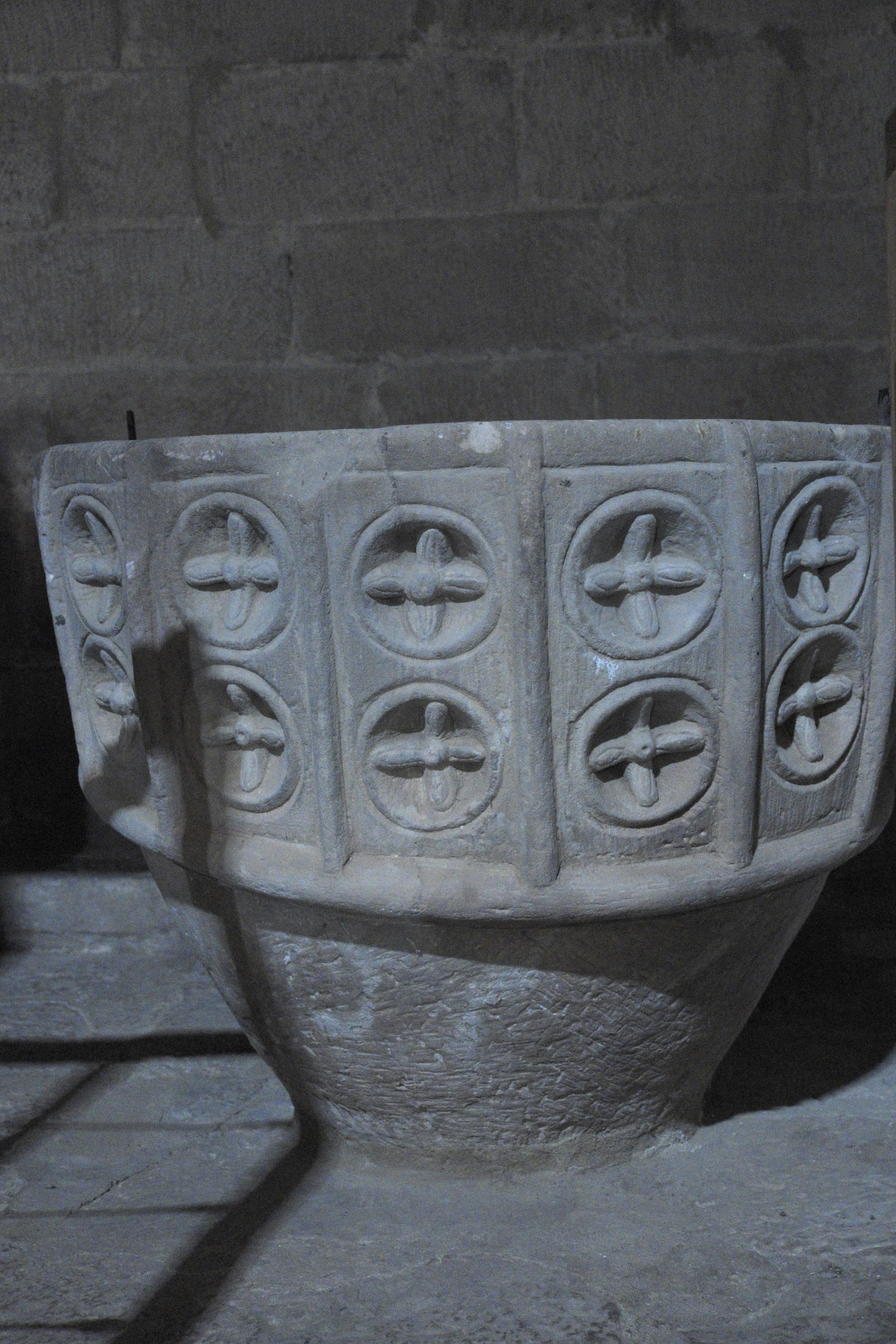 Kirche San Cornelio y San Cipriano in Revilla de Santullán in der Gemeinde Barruelo de Santullán in der Provinz Palencia (Kastilien-León/Spanien), Taufbecken